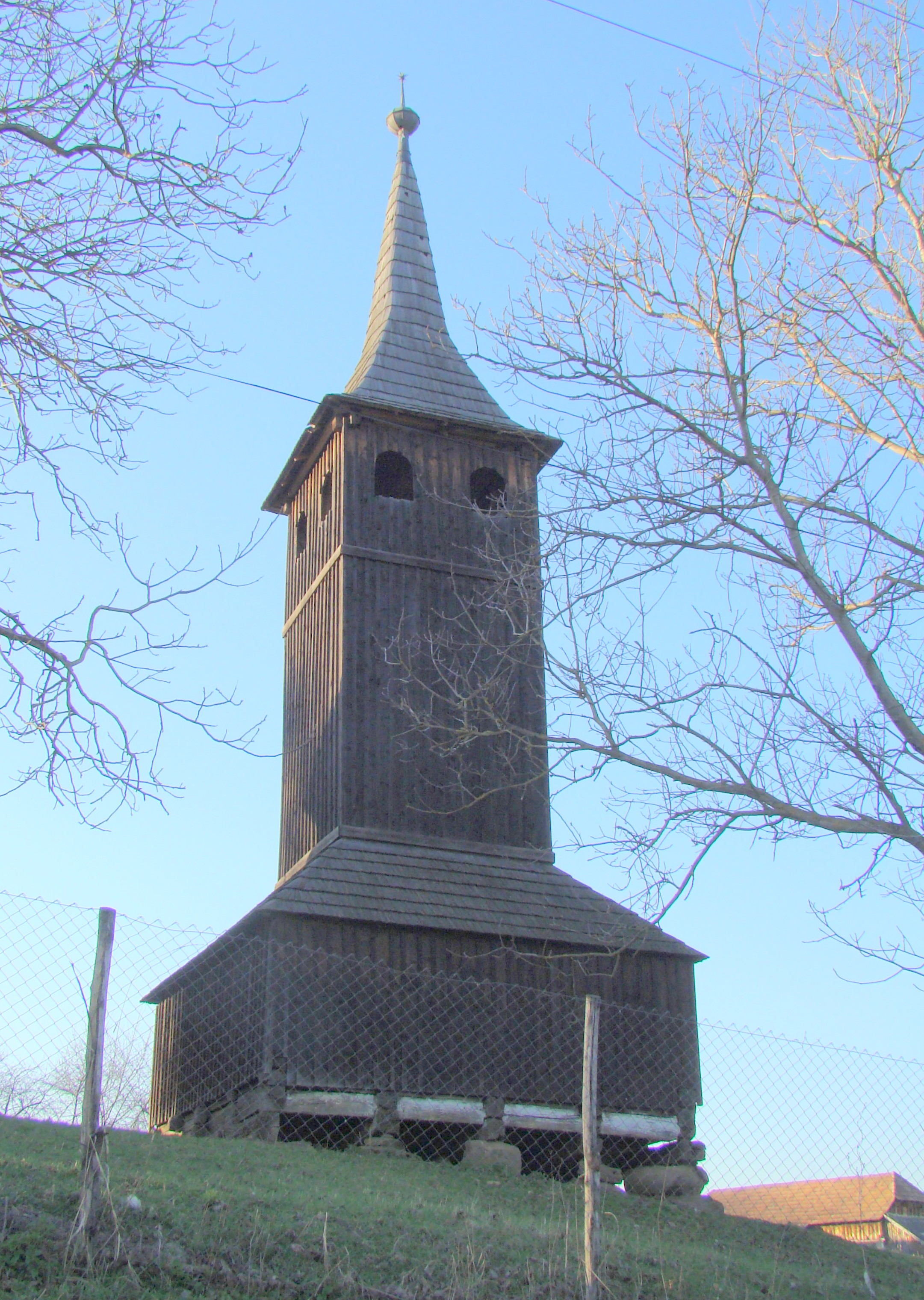 Turn-clopotniță din lemn, sat Ercea; comuna Băla 02